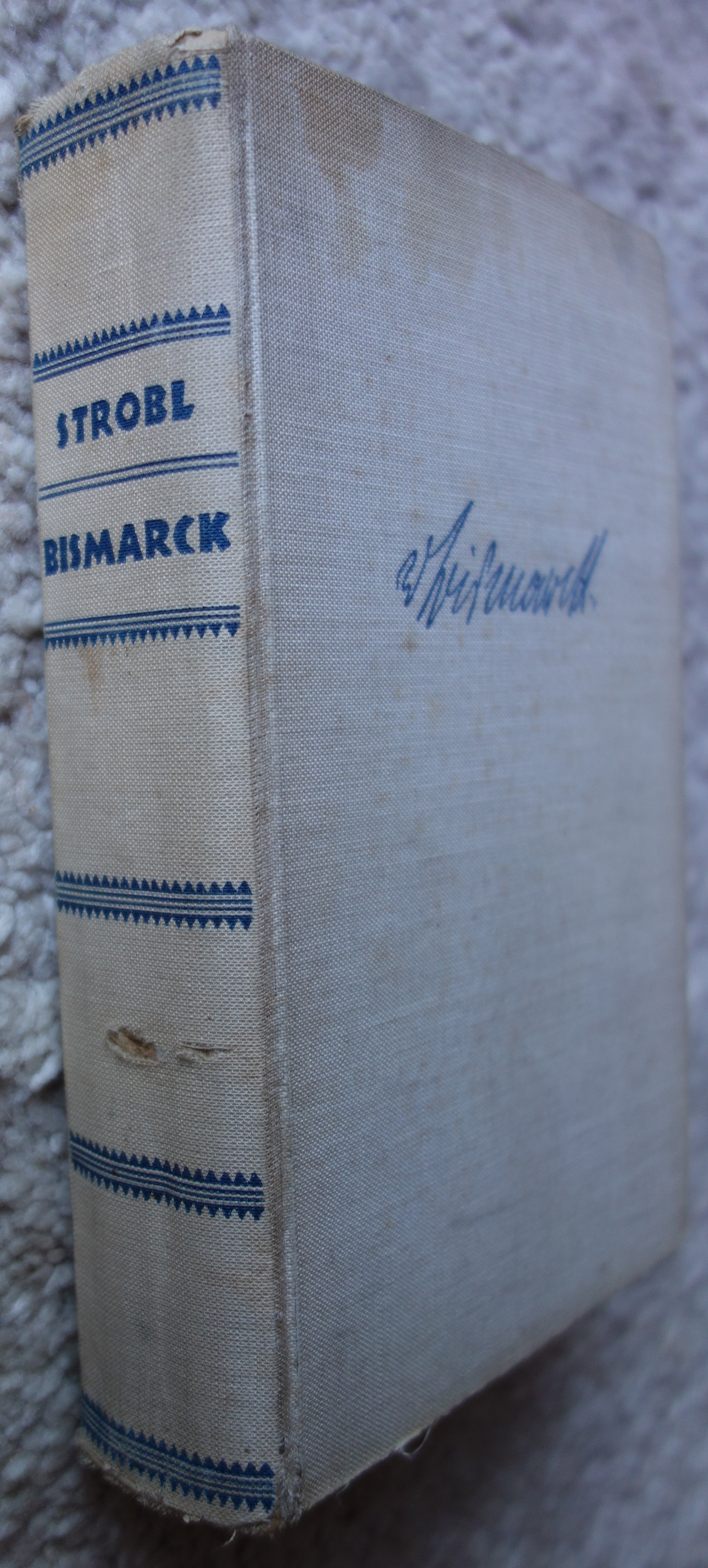 Karl Hans Strobl: Bismarck